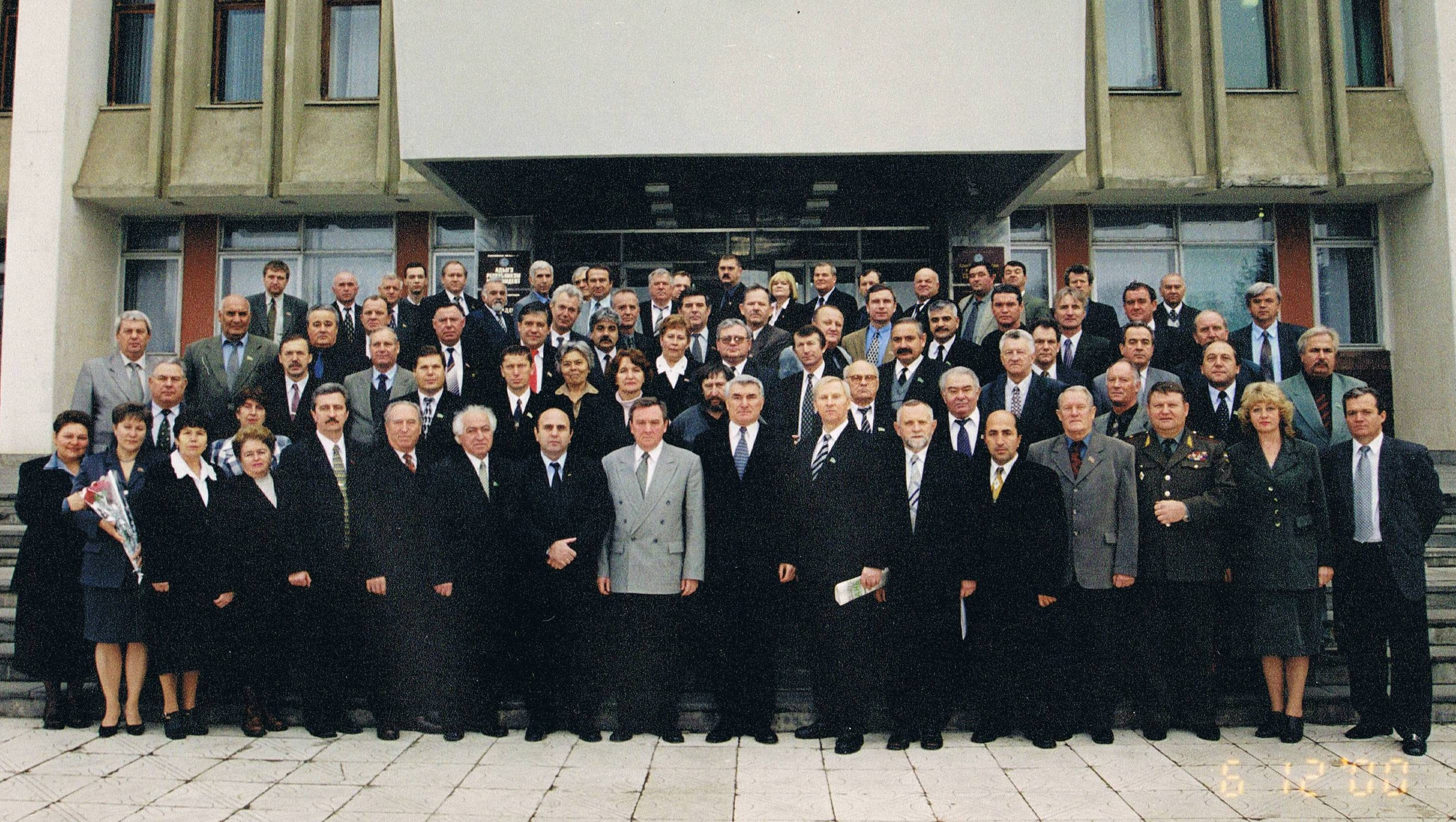 Парламенты Краснодарского края и Адыгеи. Майкоп 6.12.2000.